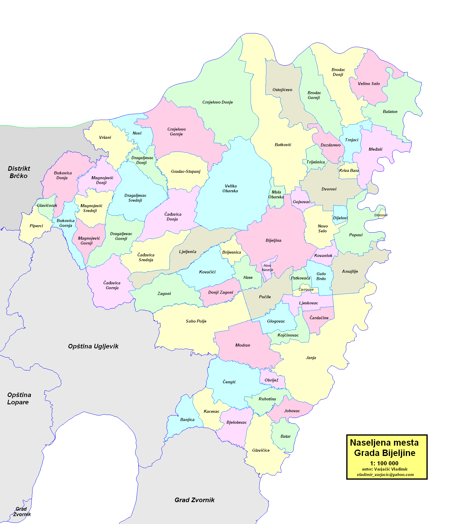 Grad Bijeljina